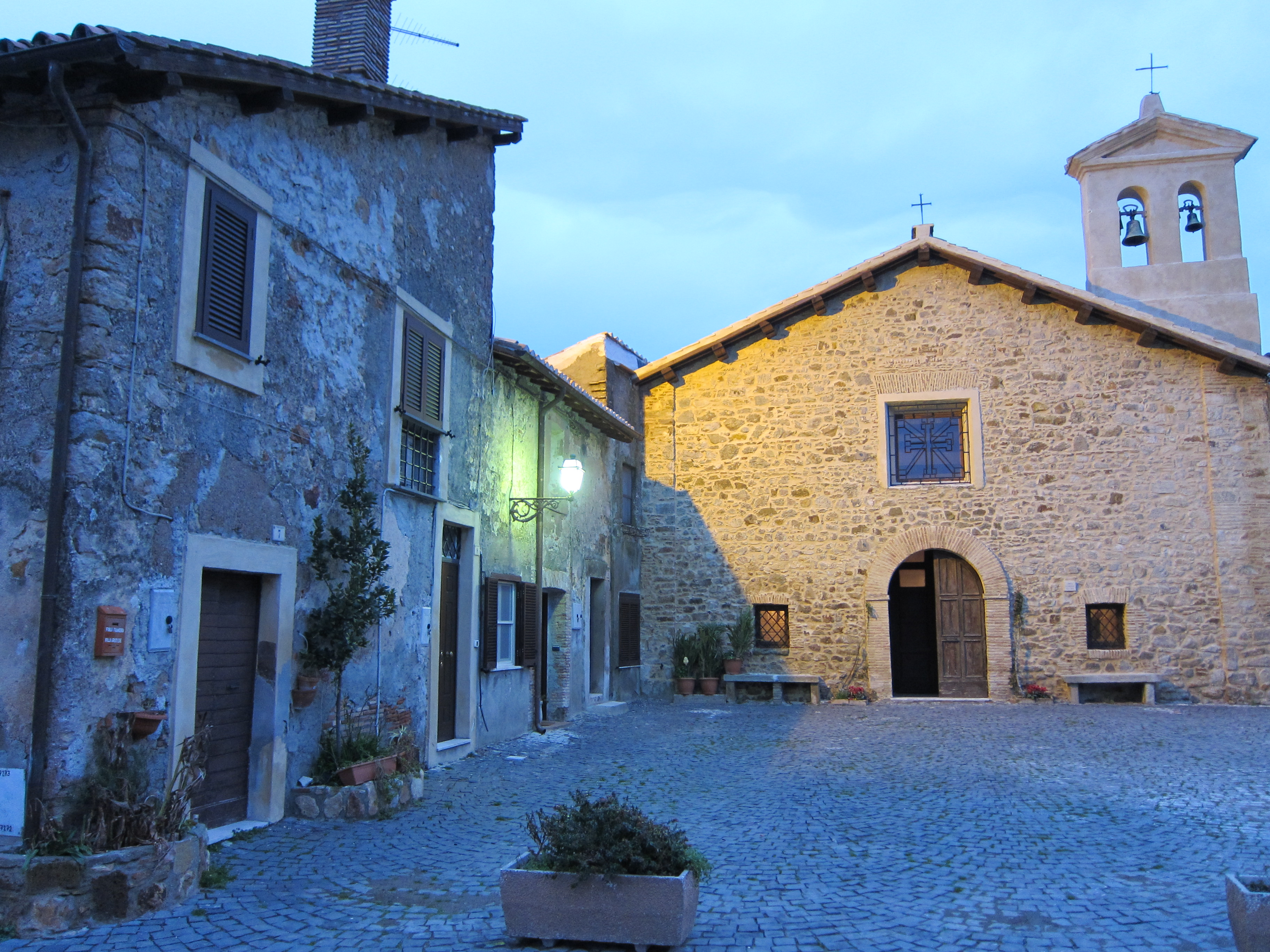 Piazza e Chiesa di Santa Croce a Sasso, frazione di Cerveteri (RM)